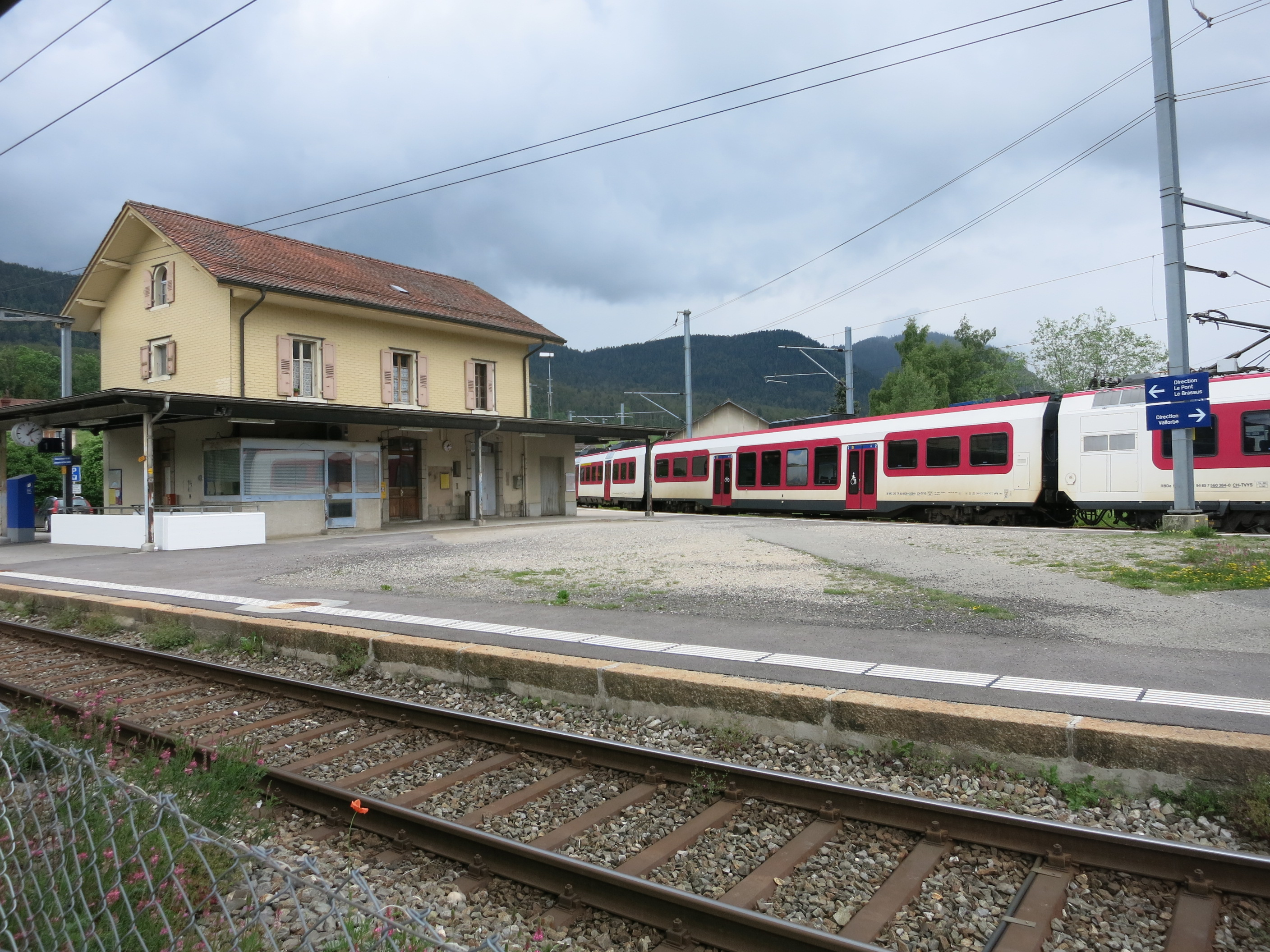 Bahnhof Le Day, Vallorbe VD, Schweiz